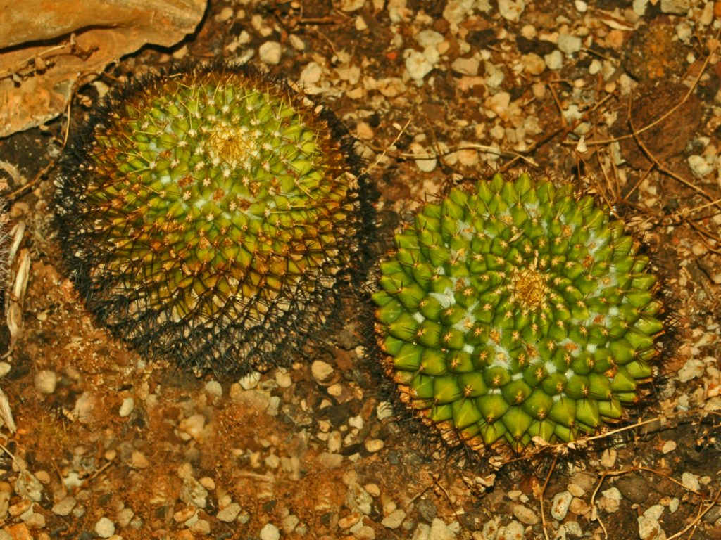 Mammiliaria marksiana at the botanical garden of Villa Durazzo-Pallavicini, Genova Pegli